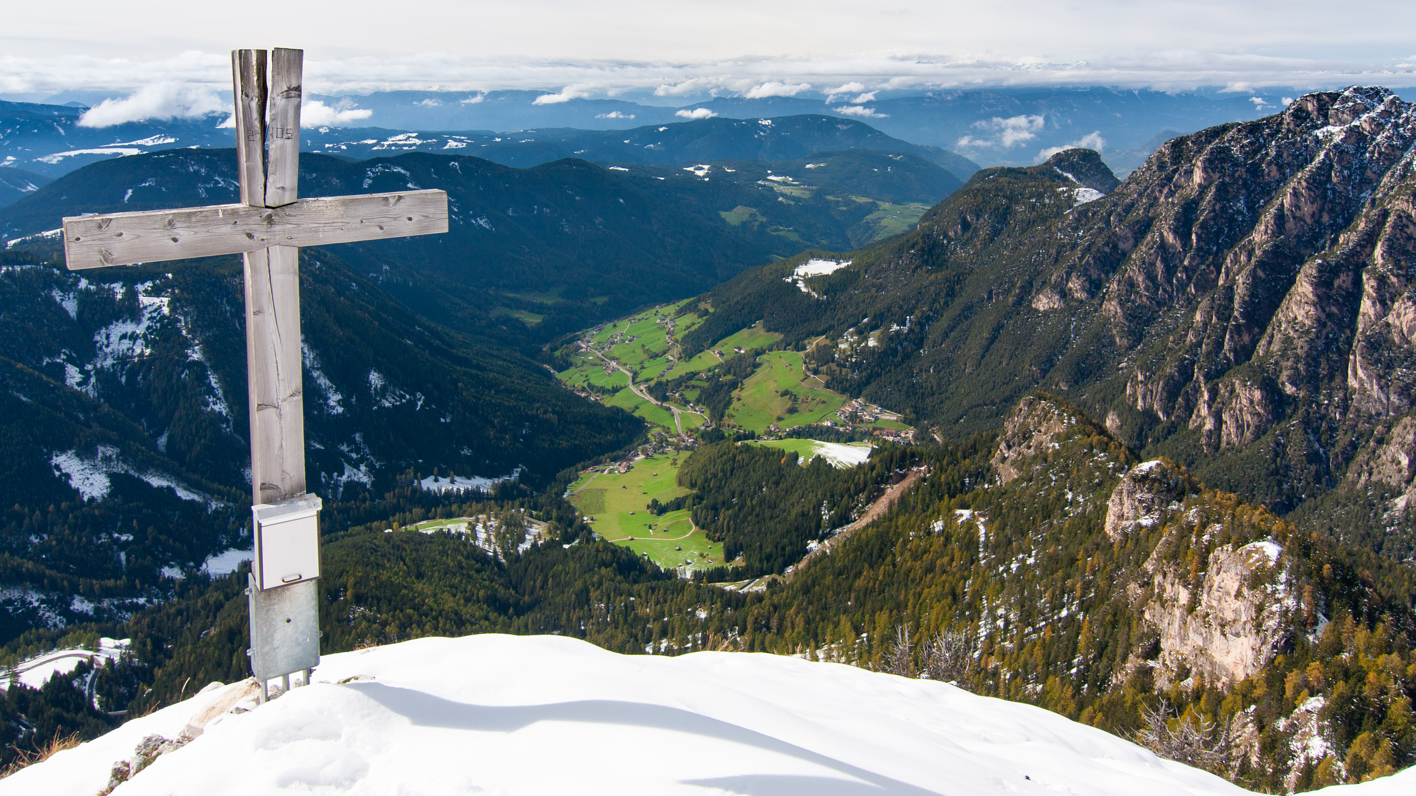 Das Tierser Tal in Südtirol, gesehen vom Gipfel der Söllnpitze (2186 m).